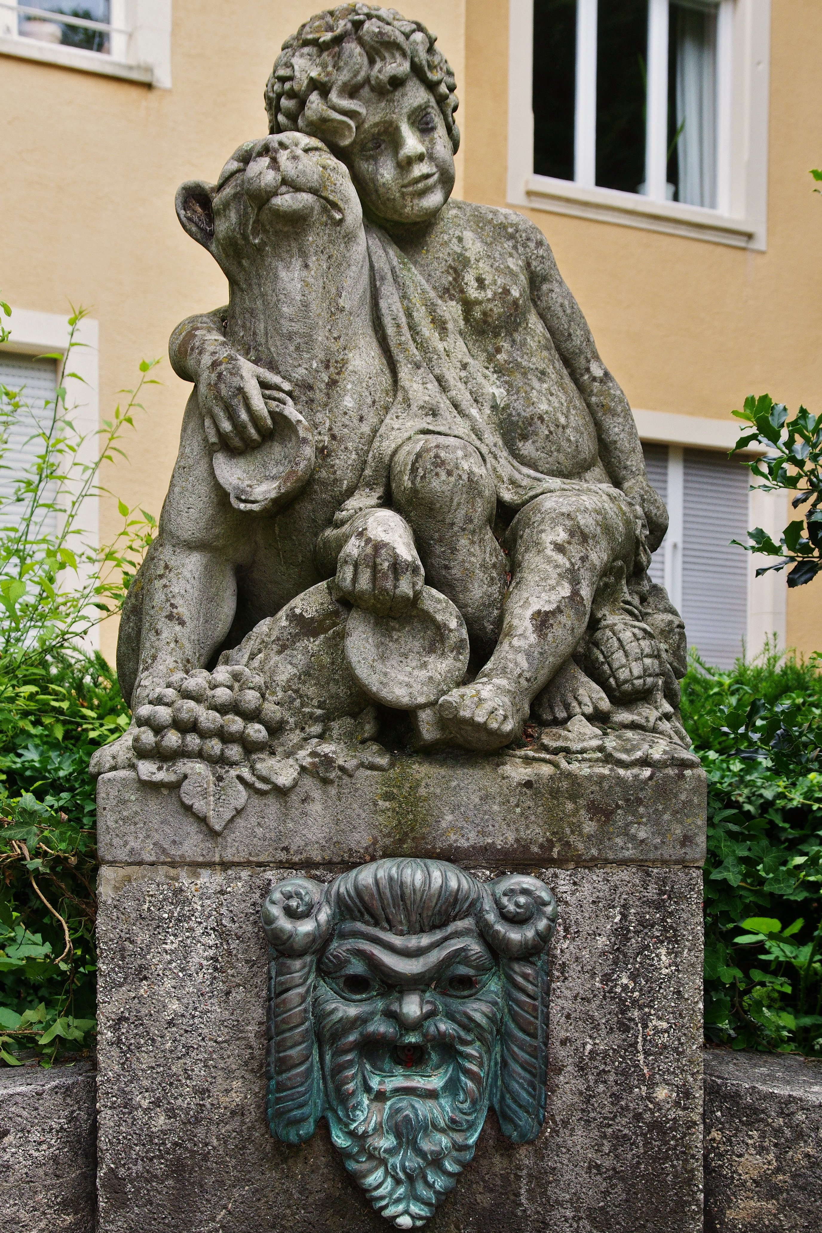 Bacchus-Brunnen in Herdern (Weiherhof-/Stadtstraße) von Friedrich Meinecke